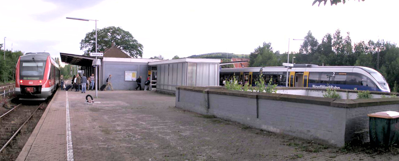 Dieseltriebwagen der Baureihe 648 im Bahnhof Ottbergen.